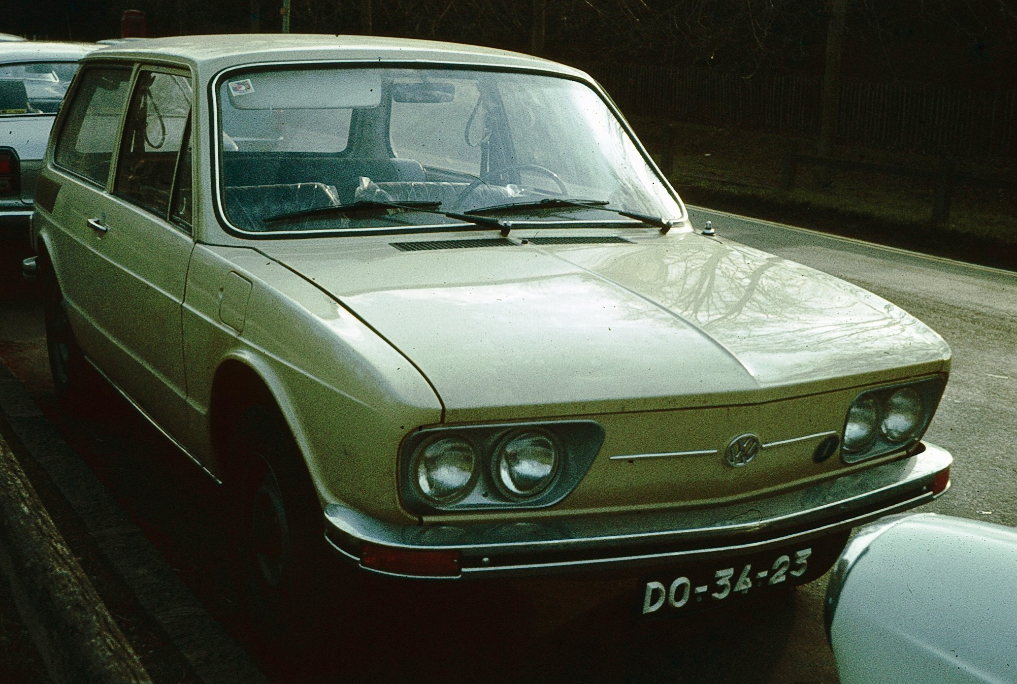 Volkswagen Brasilia from Portugal